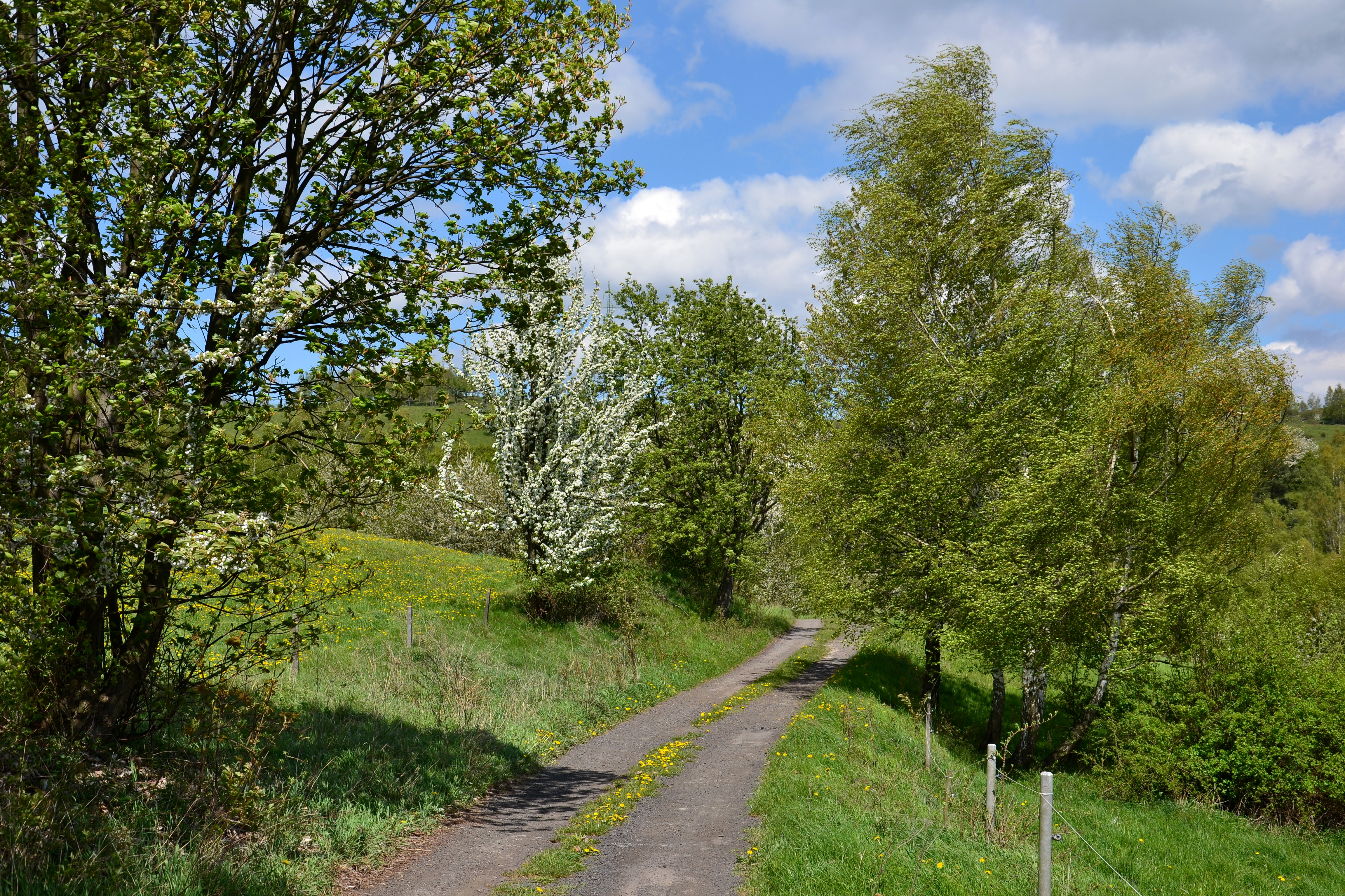 Cesta do údolí k zaniklé vesnici